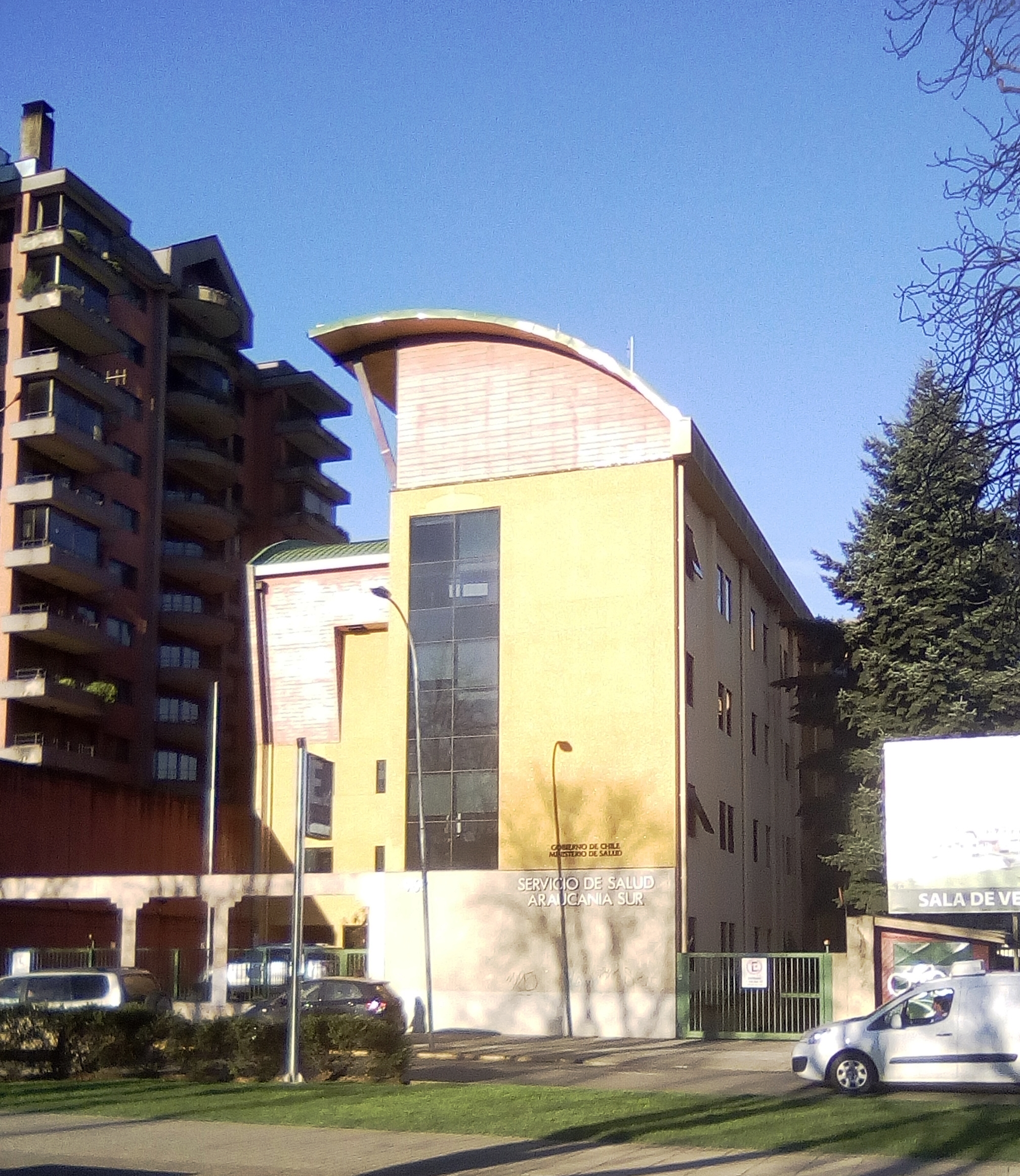 Edificio del Servicio de Salud Araucanía Sur, ubicado en la avenida Arturo Prat 969, sector Centro, Temuco, Chile.